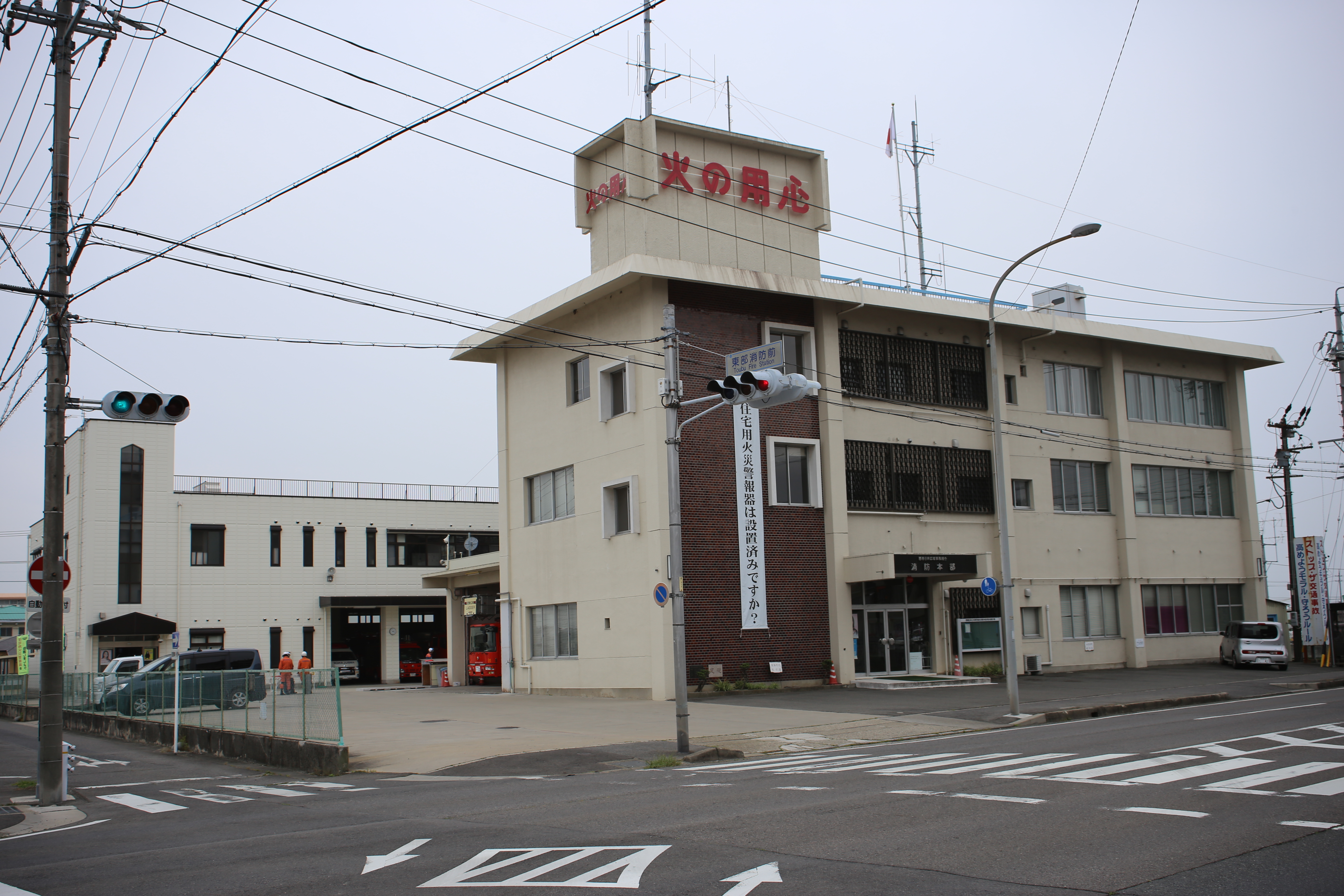 愛知県北名古屋市井瀬木狭場の西春日井広域事務組合消防本部を北側公道東側より撮影